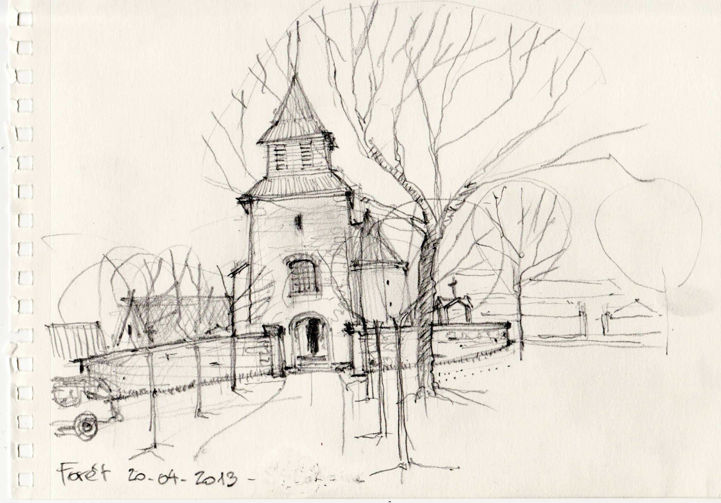 Forêt_église_enceinte cimetière_place du village